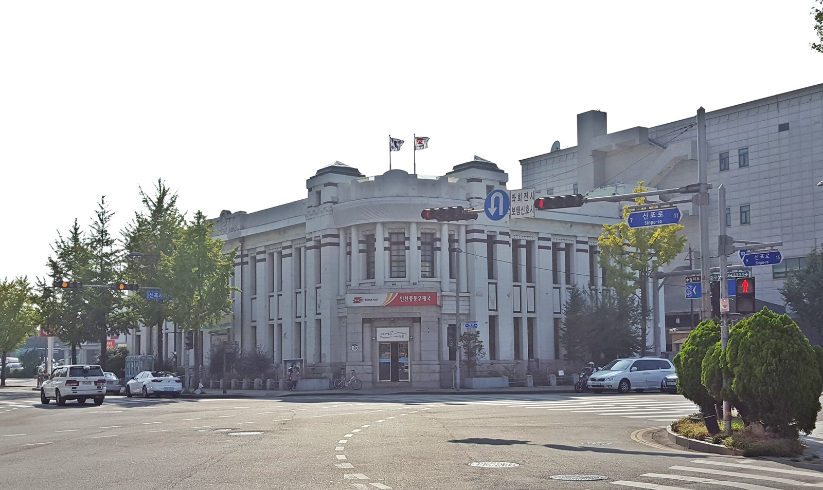 20160909 인천우체국